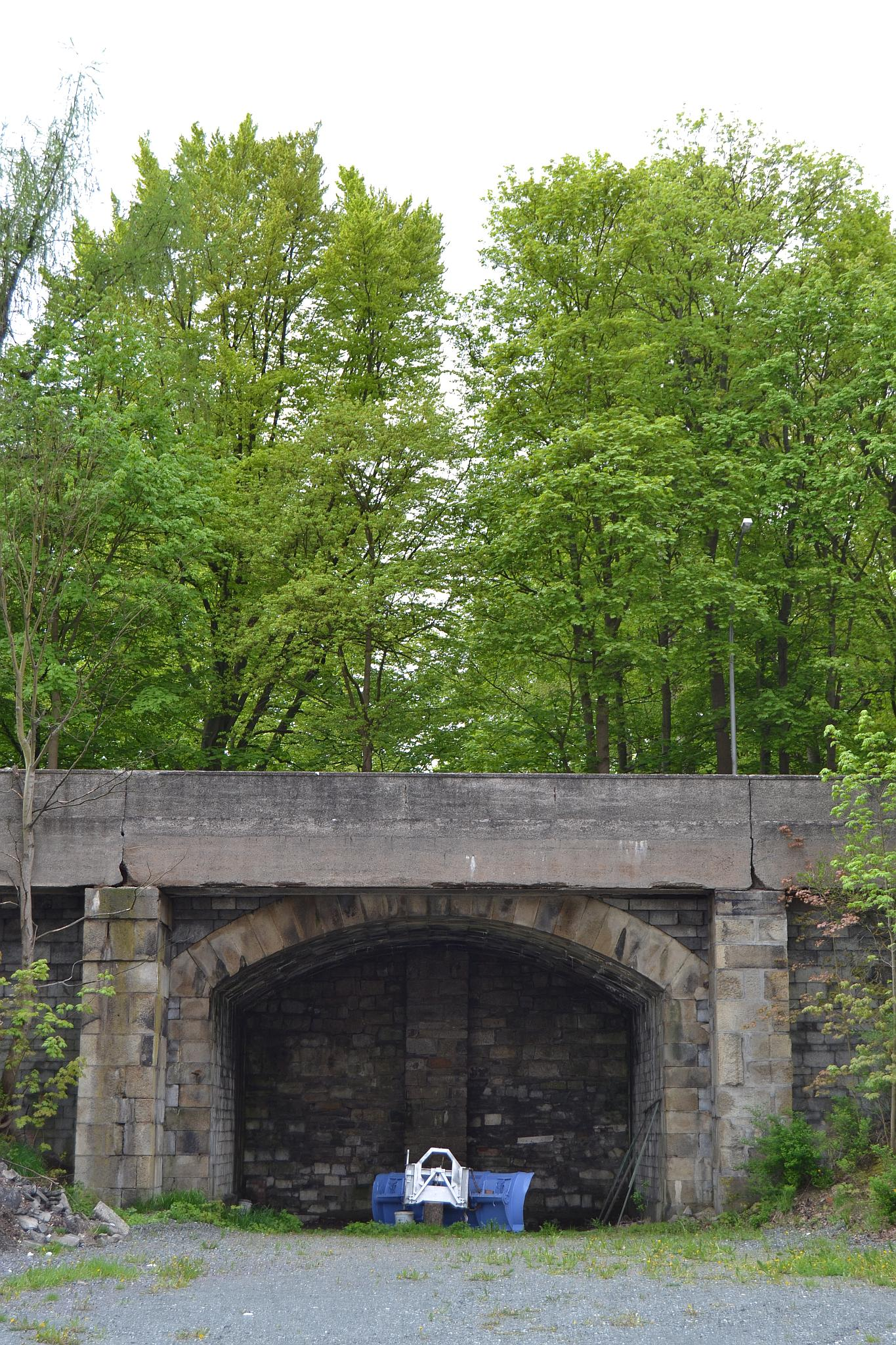 Alter Bahnhof Hof: erhaltene Unterführung der bayerischen Ausfahrt unter der alten Landstrasse nach Naila, heute Hochstraße